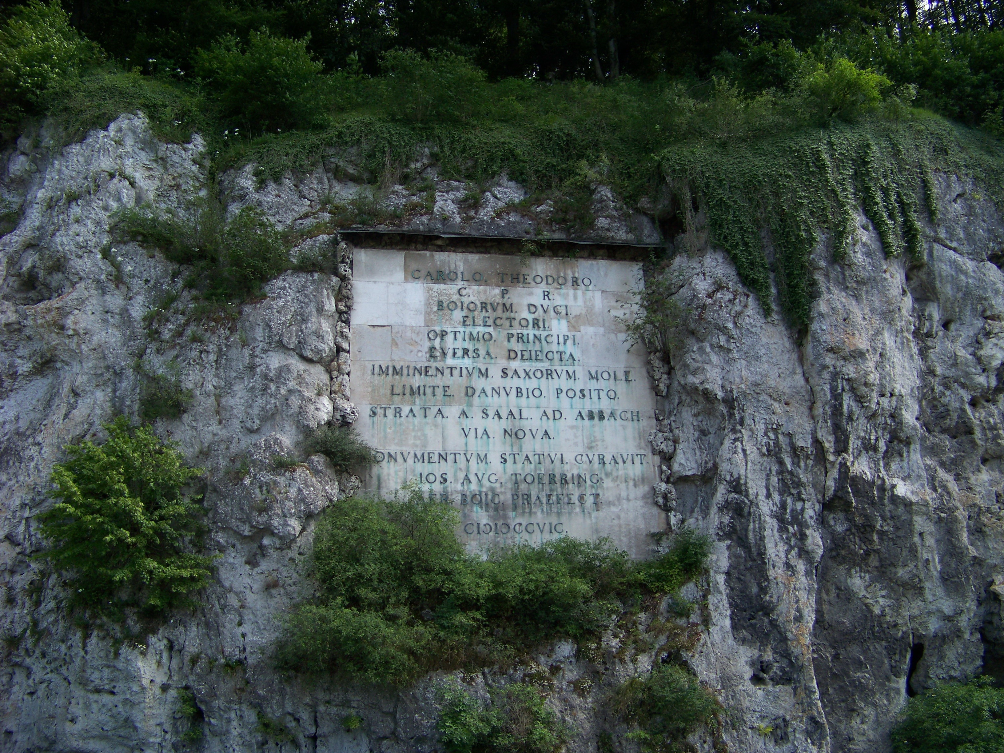 Bad Abbach, Eiermühle, Mühlberg. Inschrifttafel zur Erinnerung an den Straßenbau unter Adrian von Riedl, bezeichnet 1797, Hofsteinmetz Michael Mattheo. Text lateinisch.